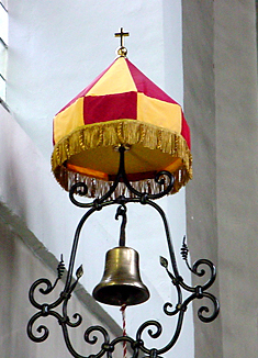 Troostkerk (basilica) in Vilvoorde, Belgium - bell and parasol [tintinnabulum and conopæum] Niels Grundtvig Nielsen, September 2006